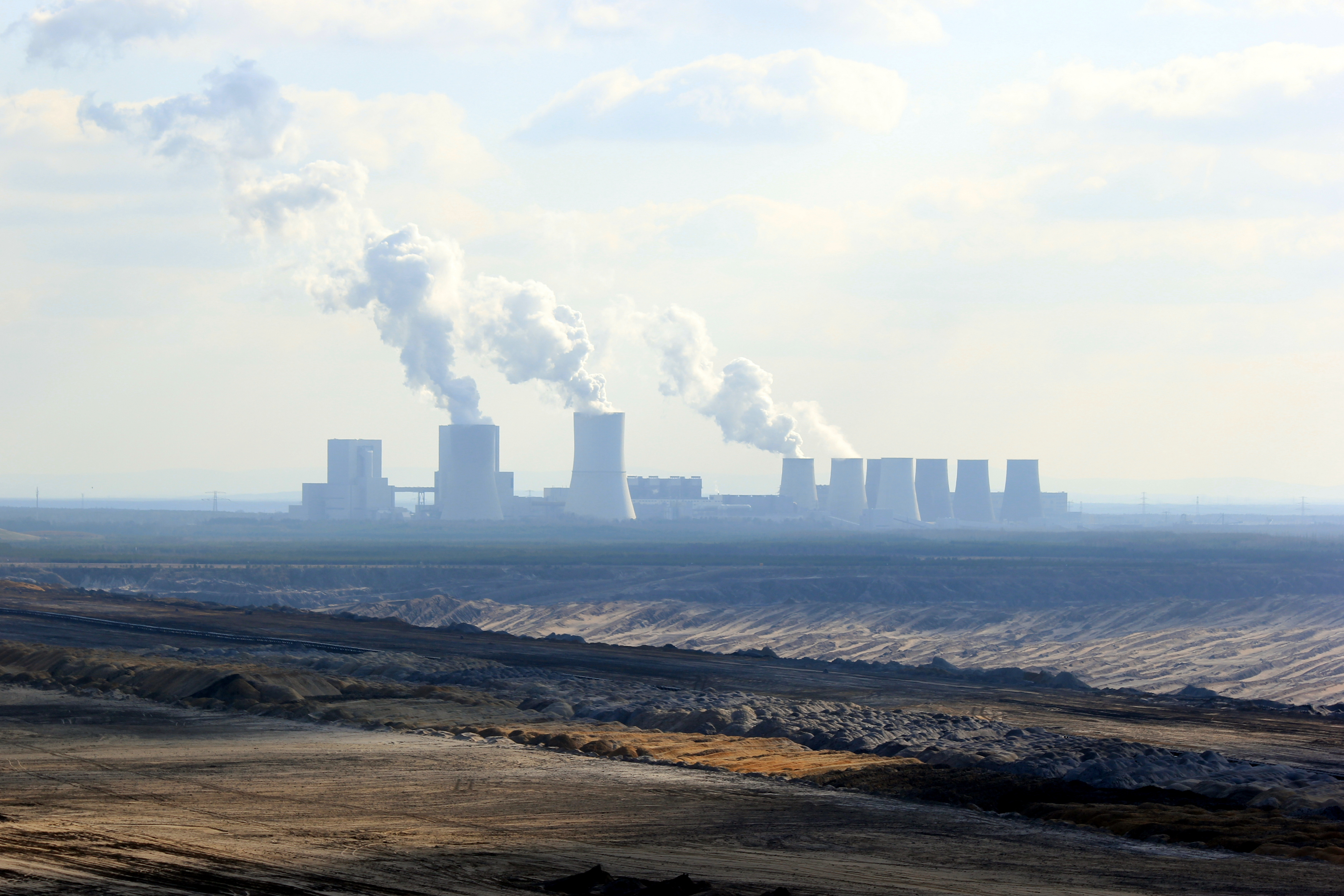 Hornjoserbsce: Napohlad něhdyšeje Wochožanskeje jamy wot rozhladneje wěže pola Běłeje Wody.